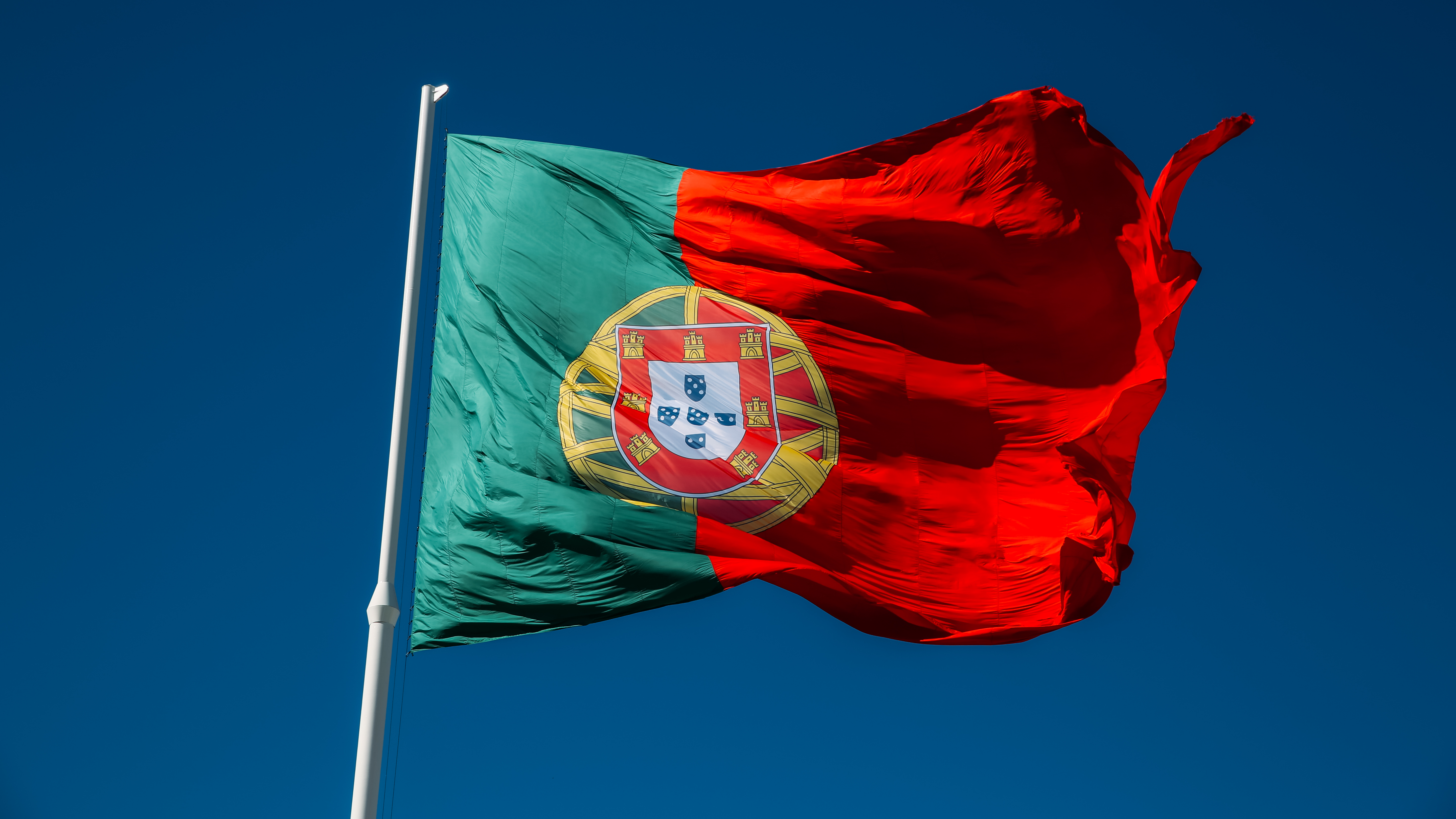 Lisbon 67